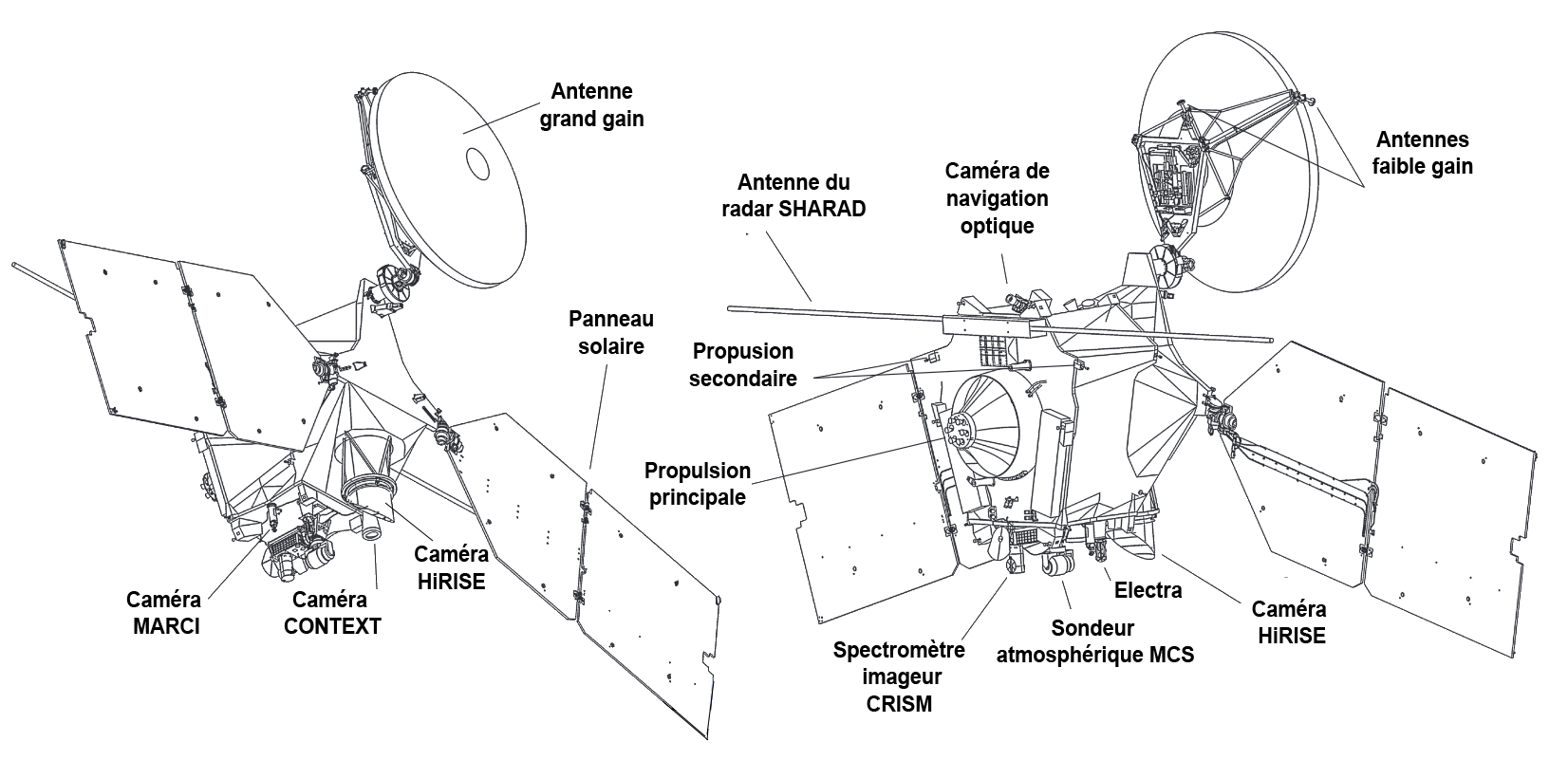 Schéma sonde spatiale martienne Mars Reconnaissance Orbiter avec libellés en francais